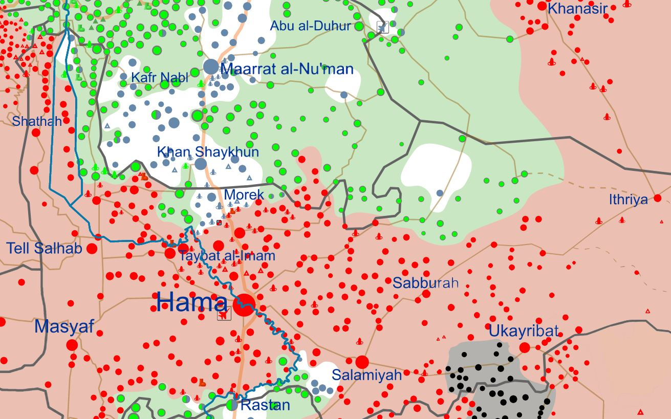 Région de Hama, en Syrie, à la date du 23 septembre 2017